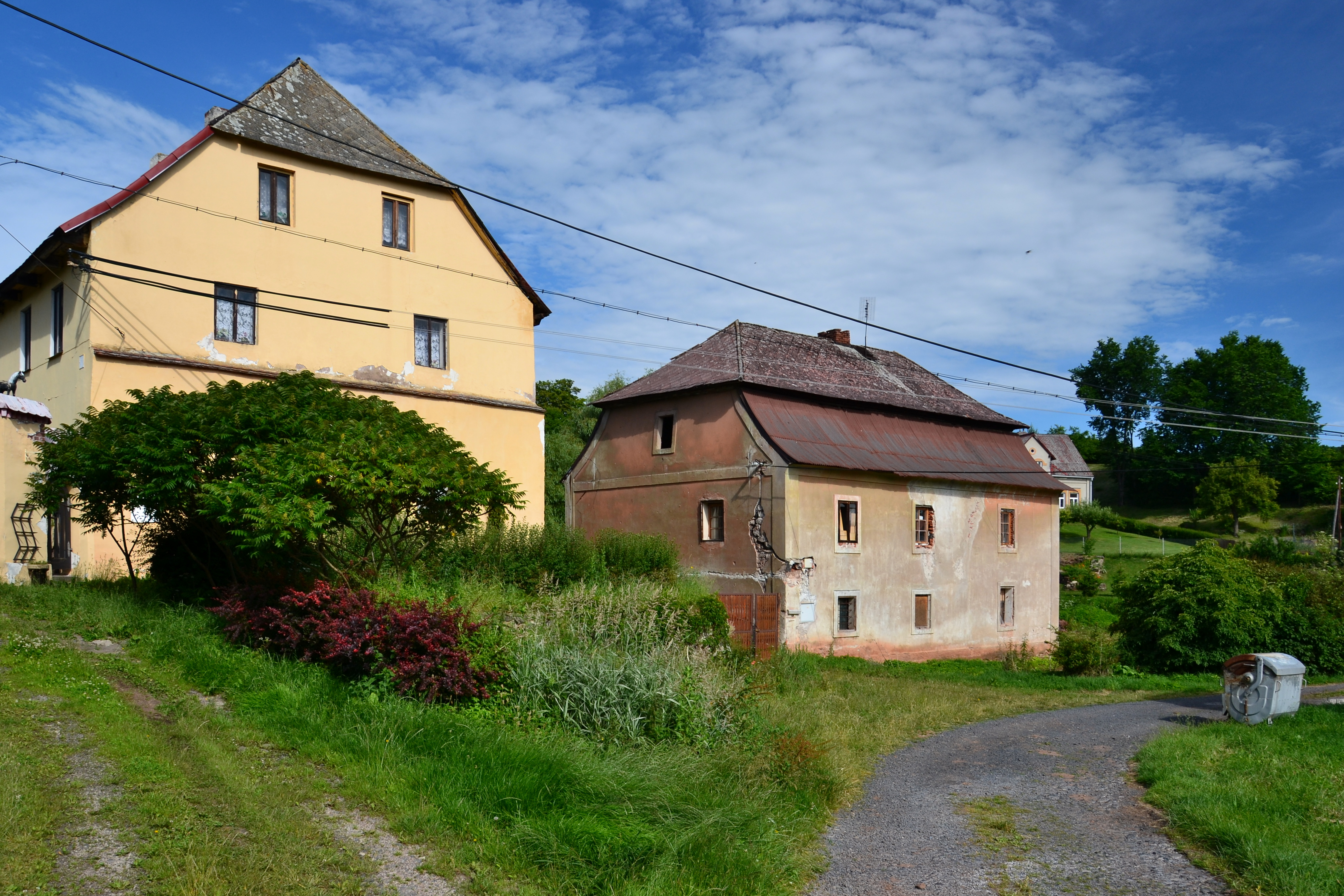 Domy u vjezdu do osady